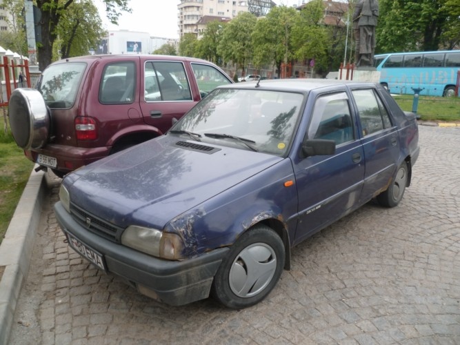 Dacia Nova photographiée à Bucarest.